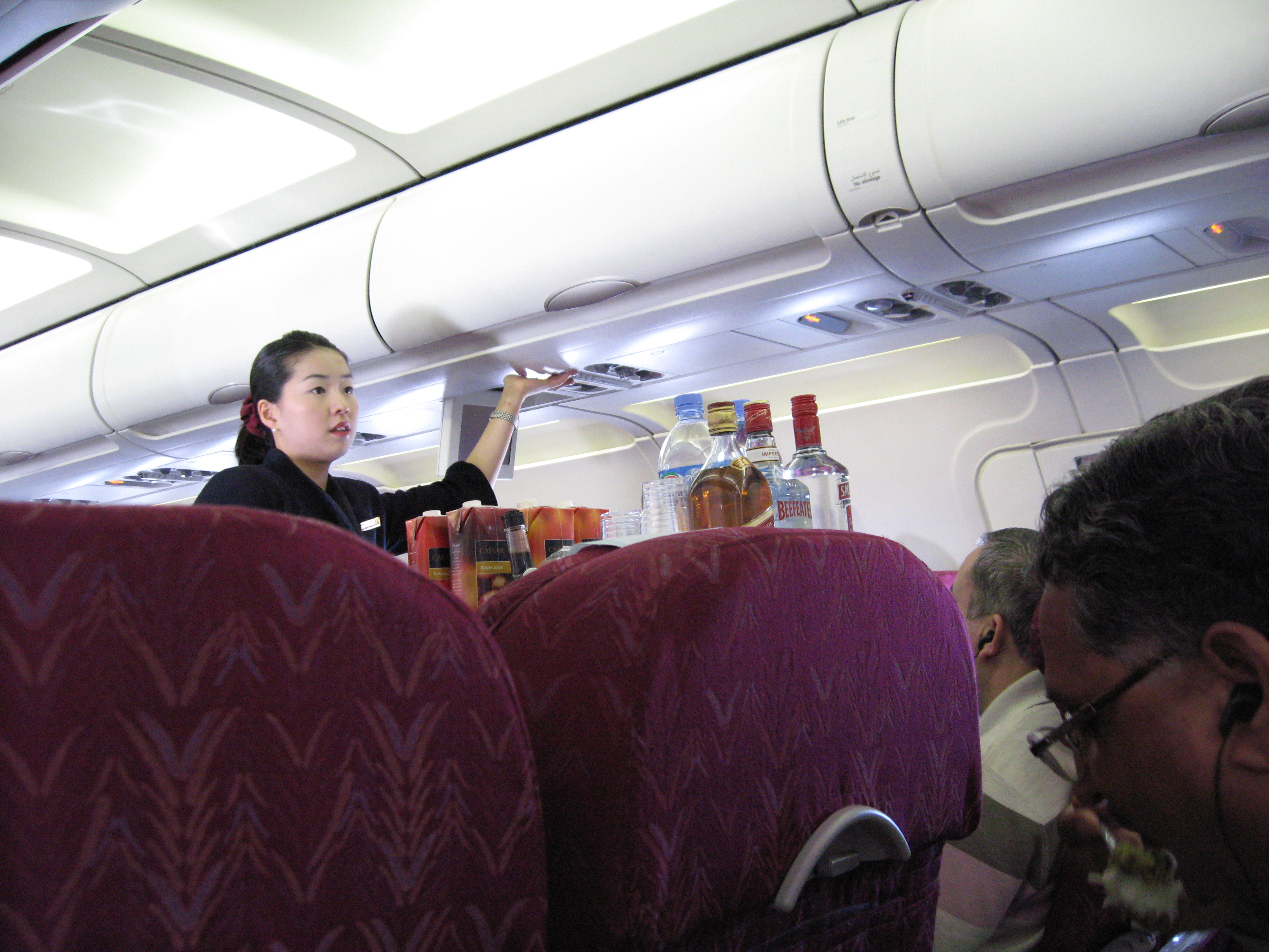 مهماندار القطریه در حال پذیرایی} در مسیر پروازی دوحه، دمشق